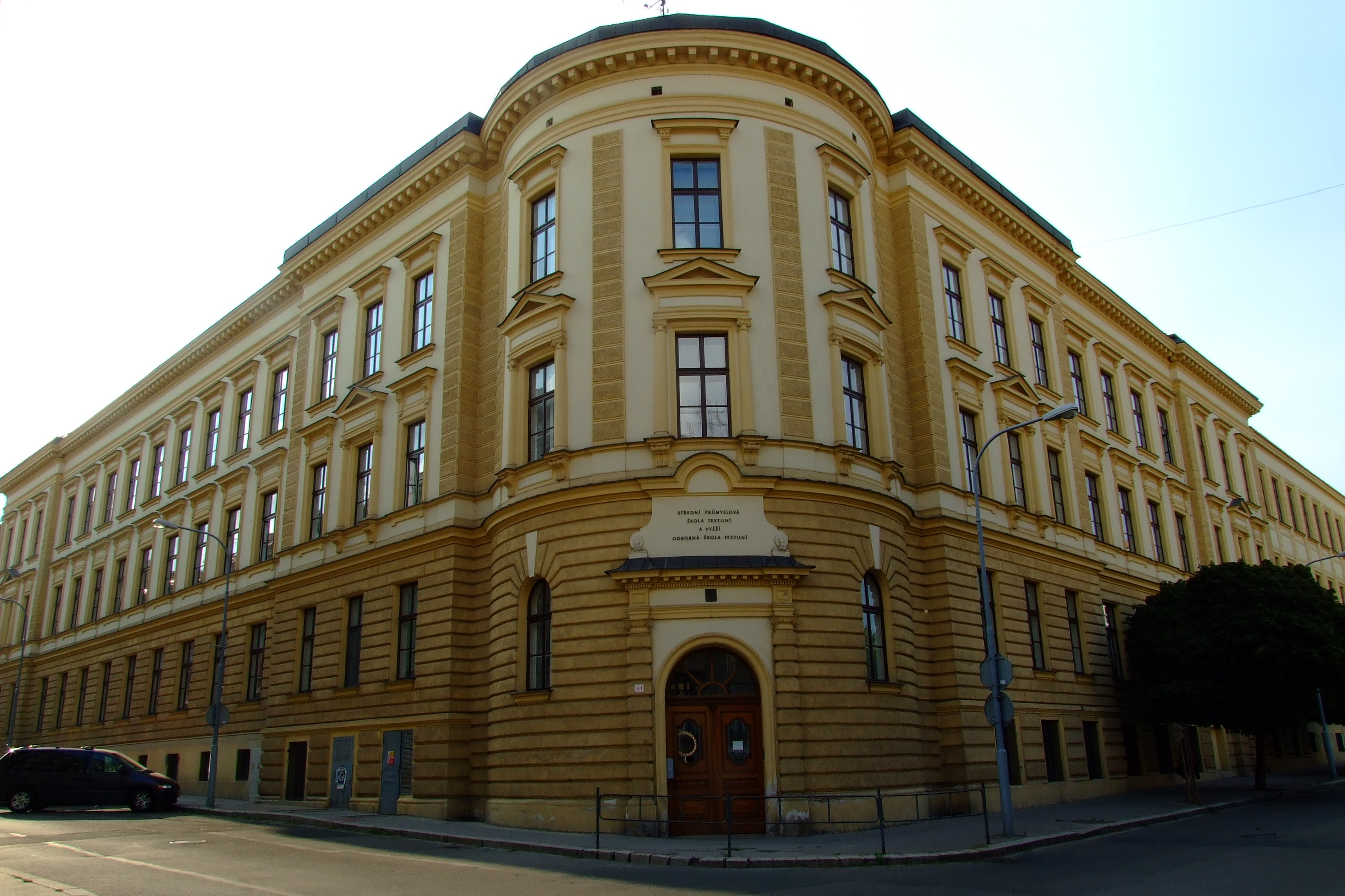 Brno-Zábrdovice - střední průmyslová škola textilní na Francouzské ulici